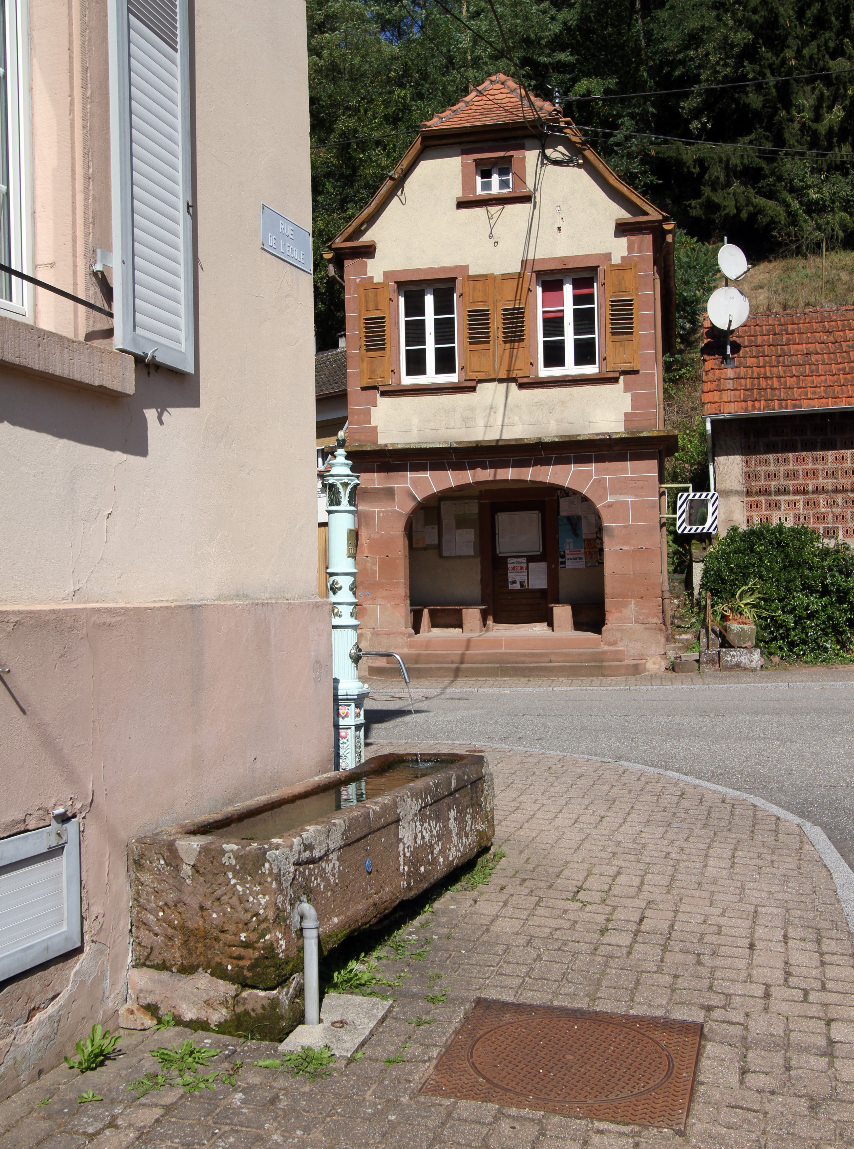 Niedersteinbach